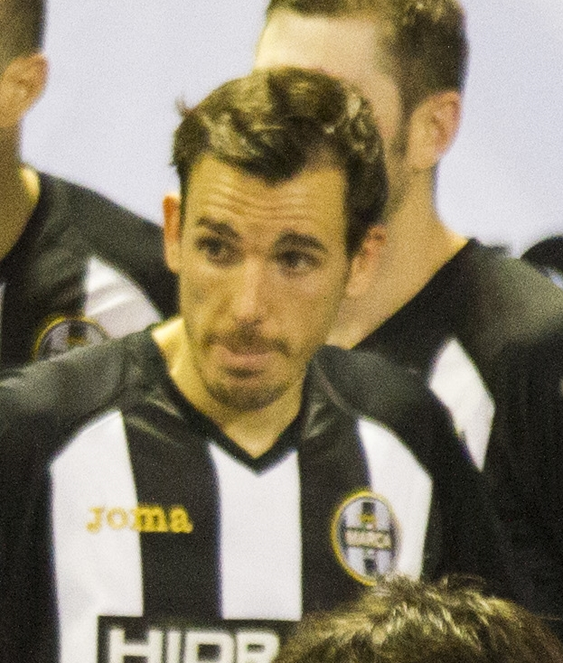 Borja Blanco Gil